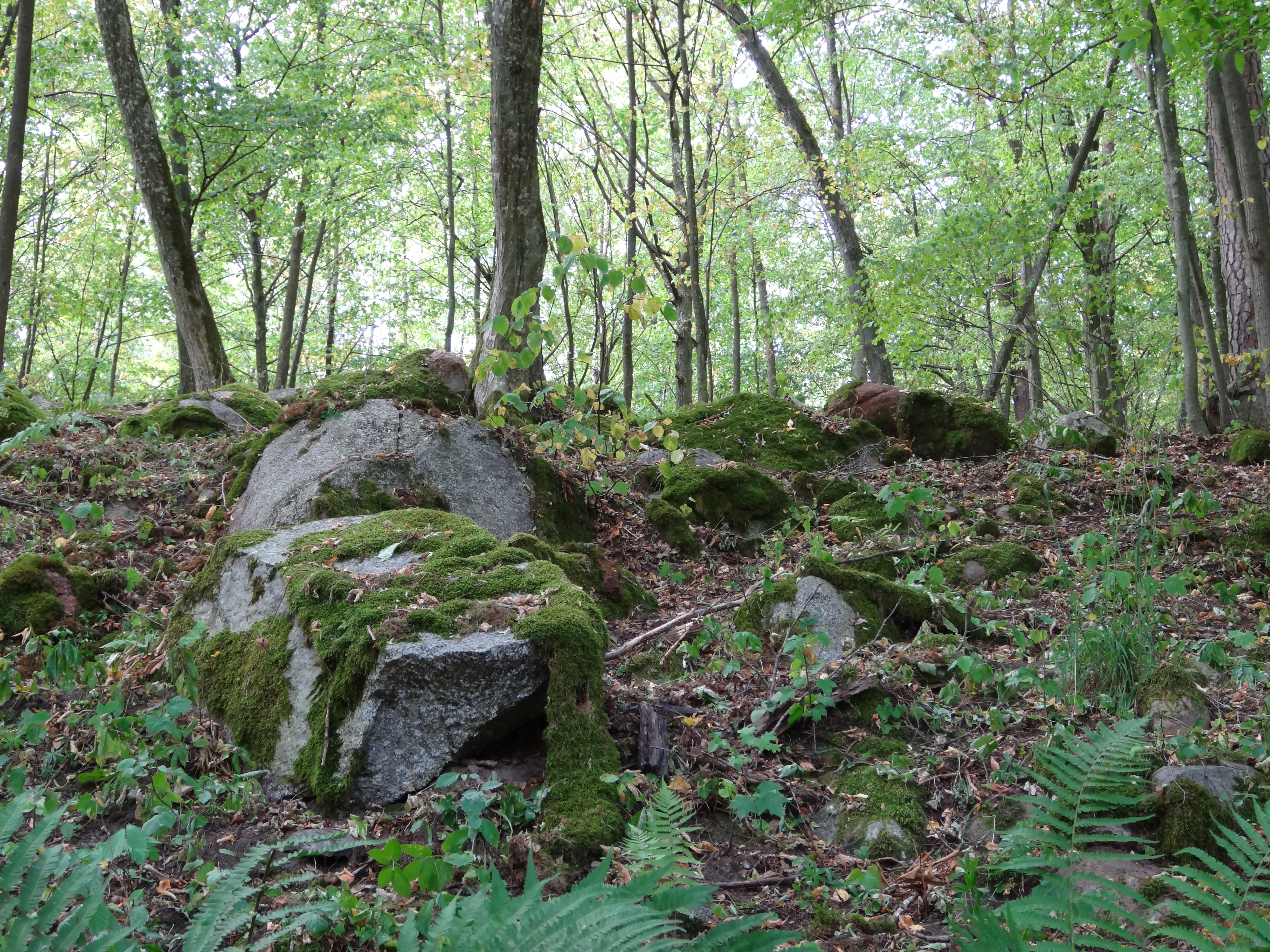 Głazowisko koło Leśniczówki Rostek